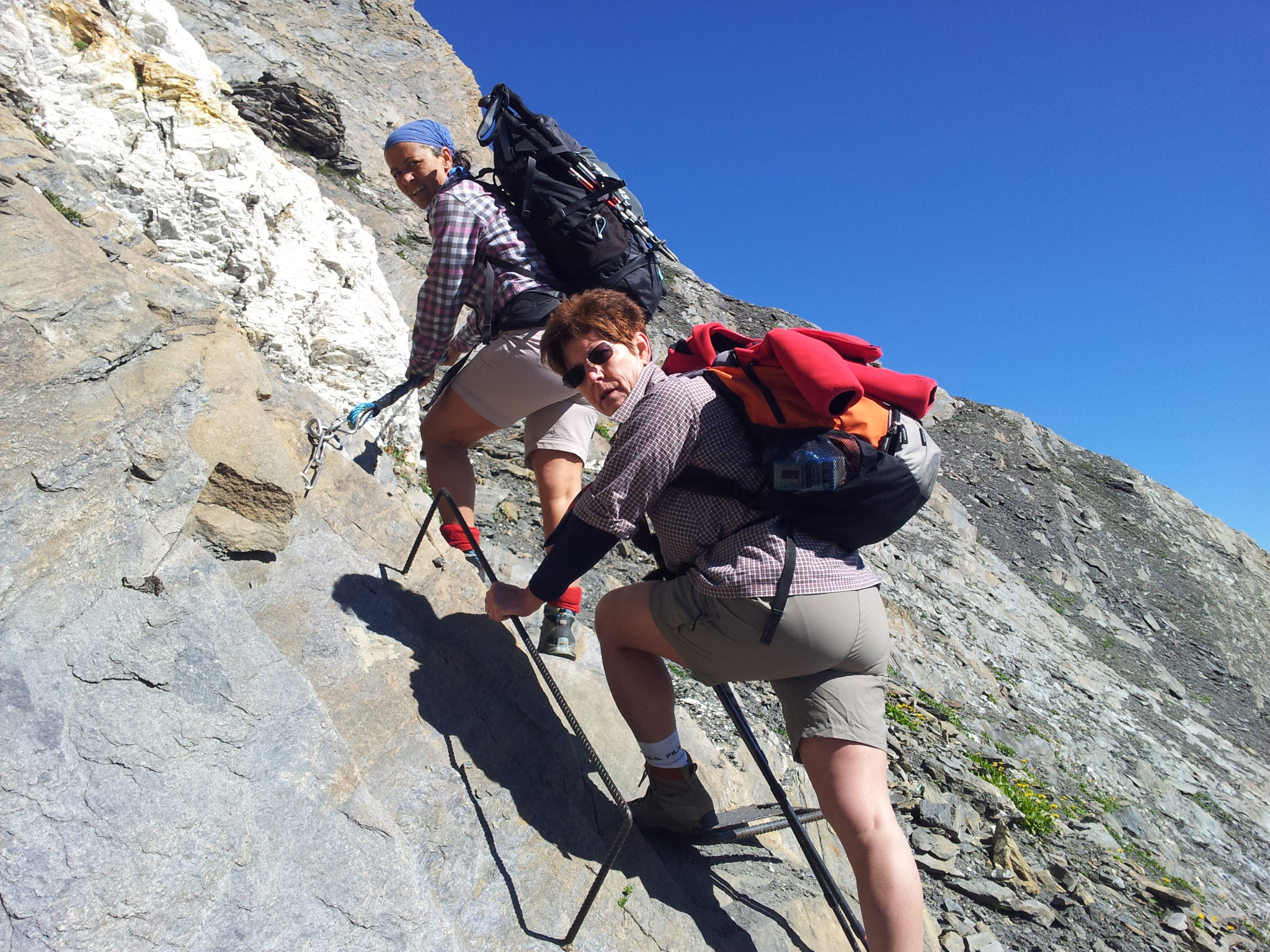 Salendo allo stretto intaglio del colle di Malatraz